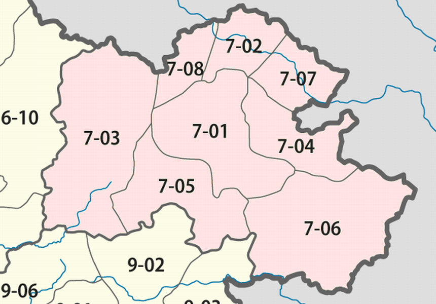 Giấy phép